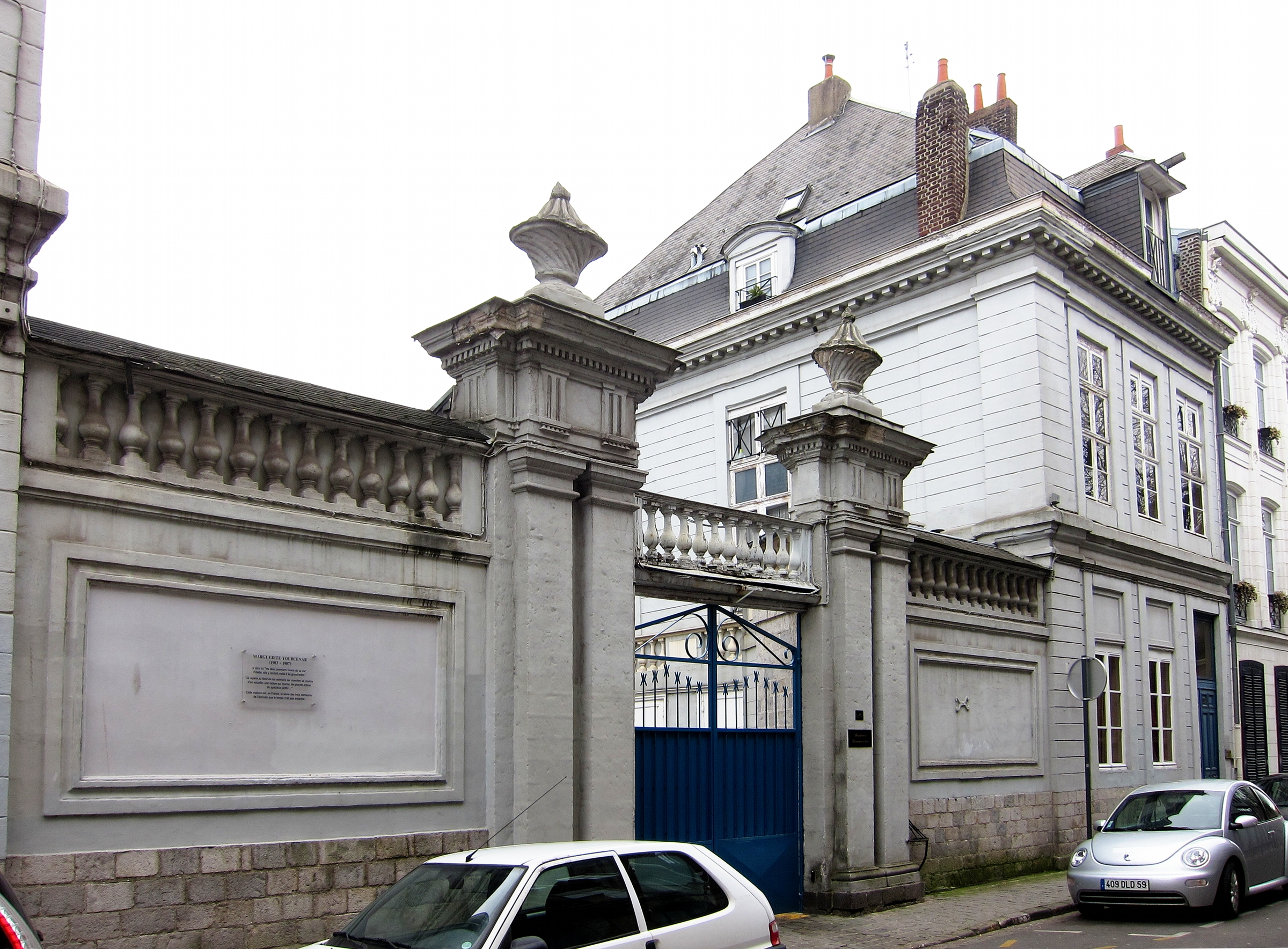 La résidence de la grand mère de Marguerite Yourcenar rue Jean-Moulin à Lille.